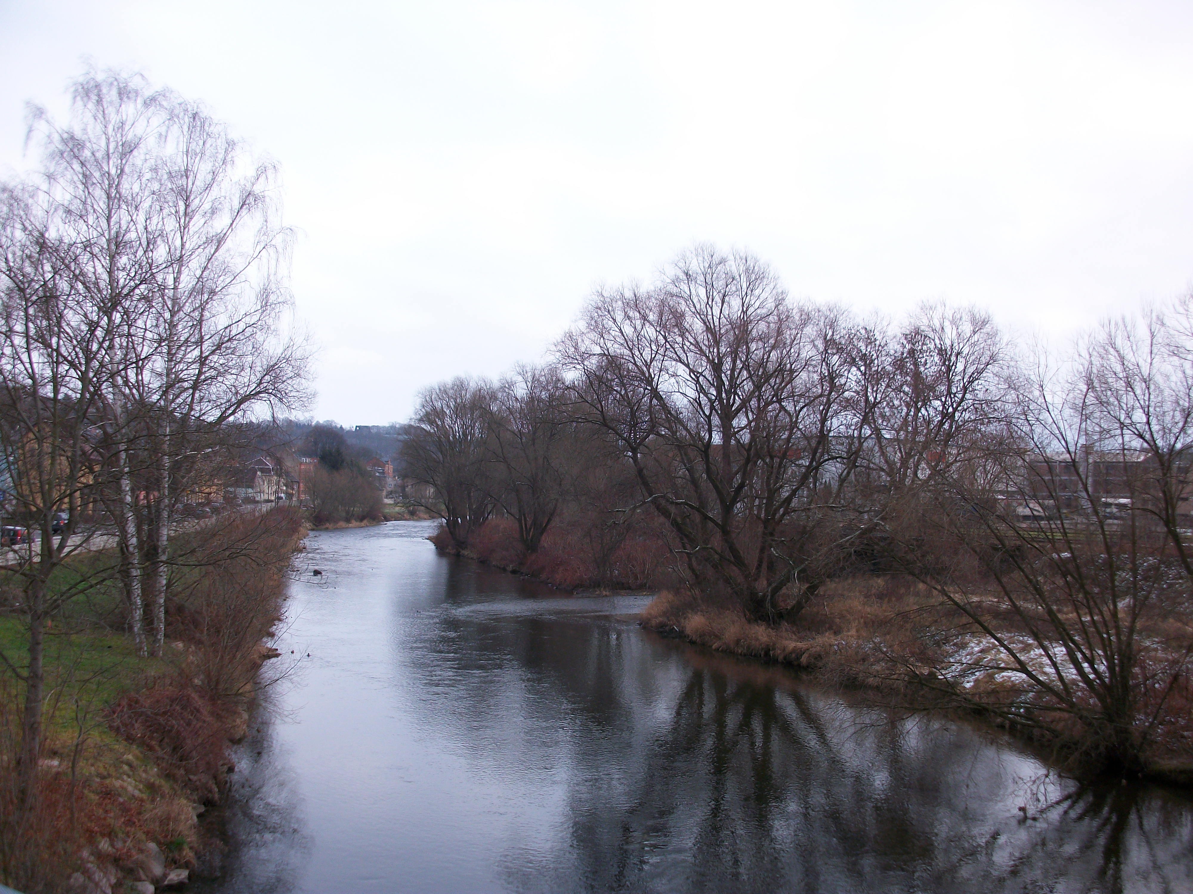 Zwickauer Mulde mit Rödelbachmündung